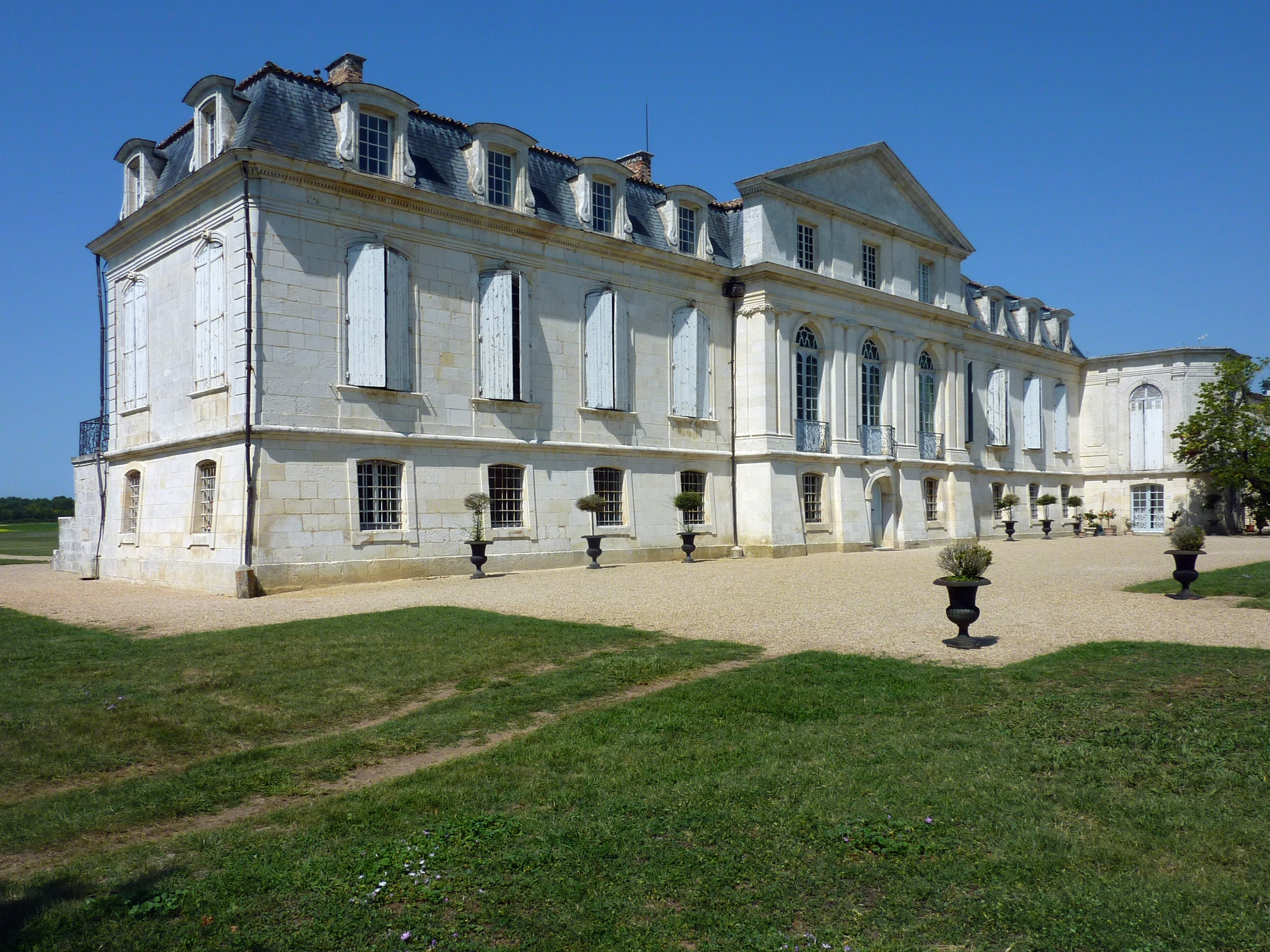 Château de la Gataudière Marennes Charente Maritime France